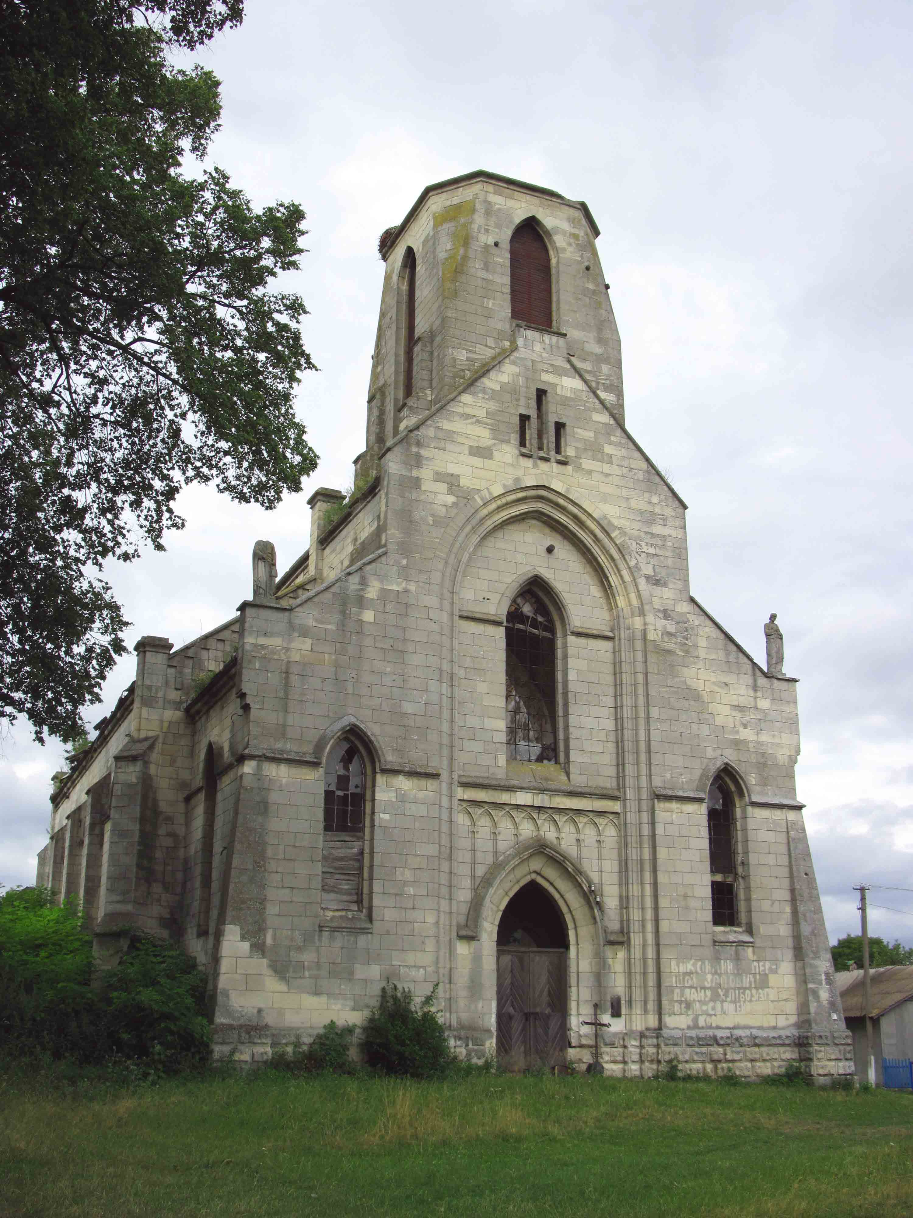 Костел св. Івана Хрестителя (1914 р.) у Мильному Зборівського району Тернопільської області